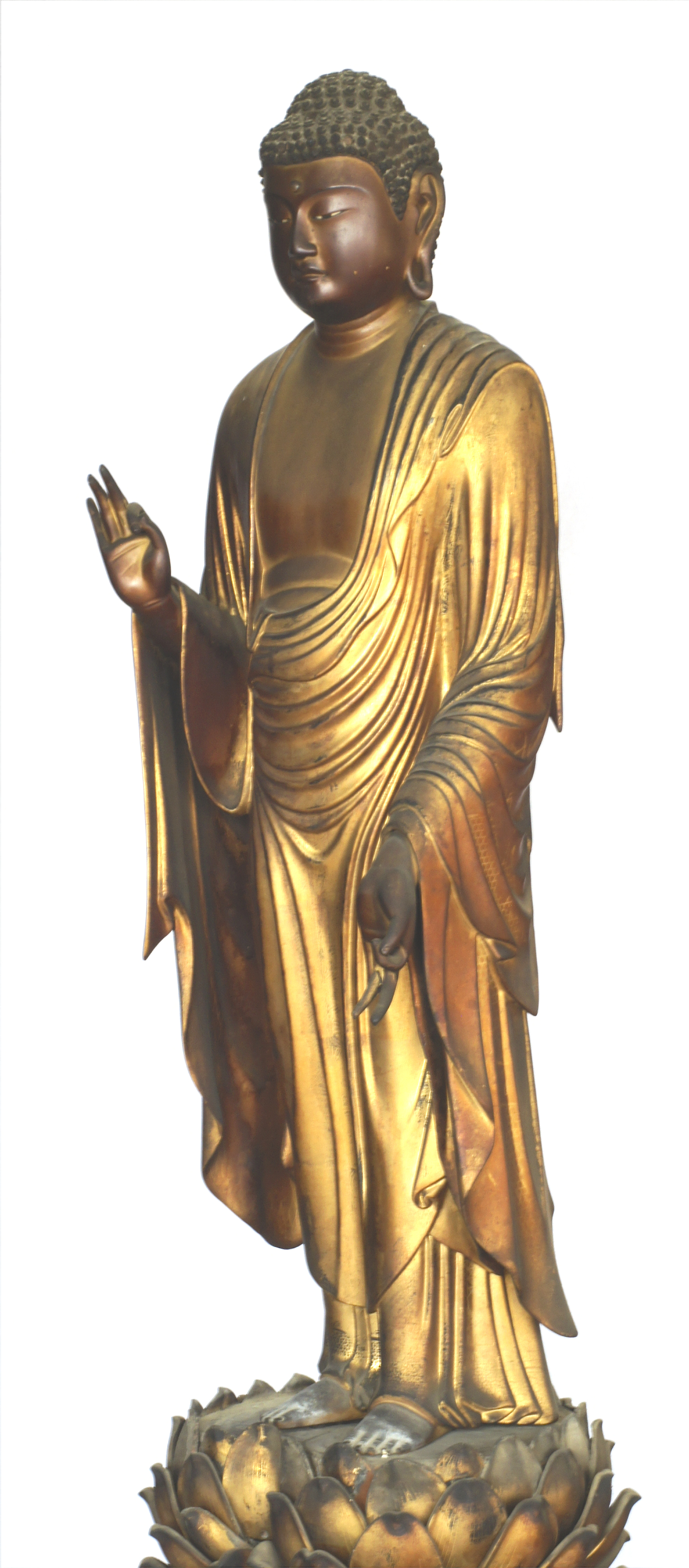 道樹寺の阿弥陀如来立像 光背なし